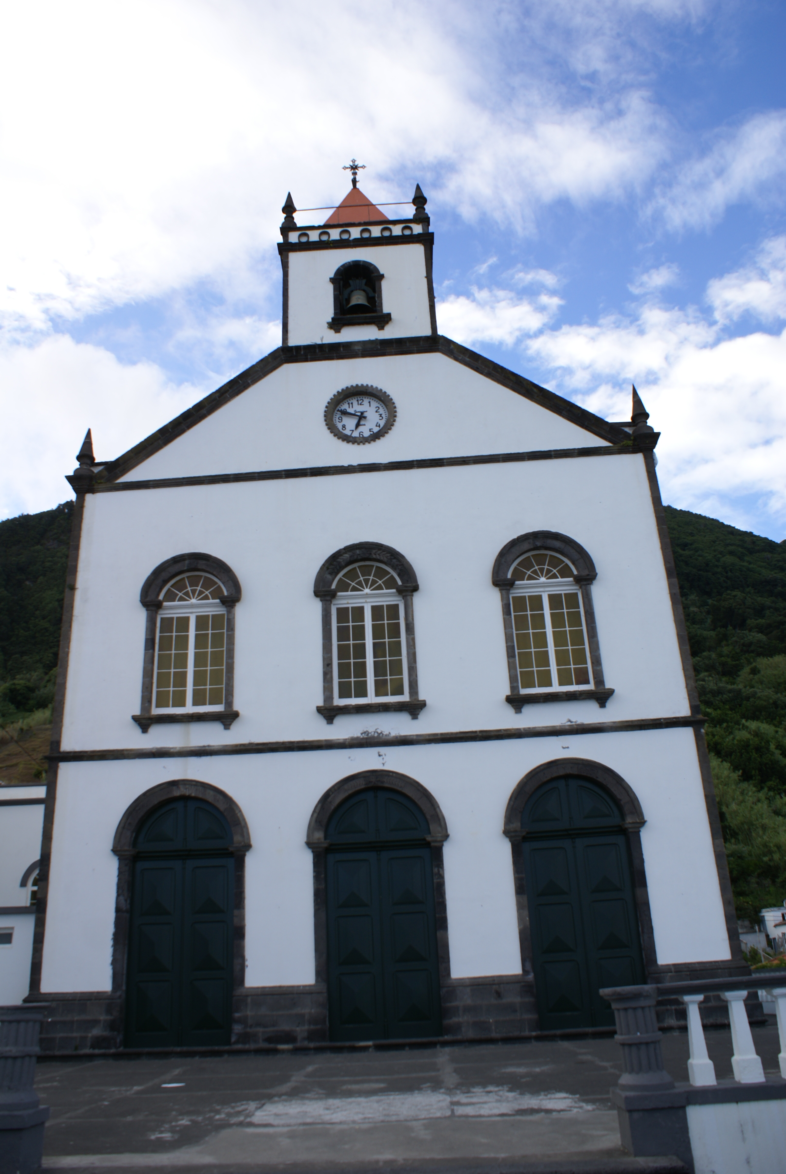 Igreja de São Paulo, Ribeira Quente, ilha de São Miguel, Açores